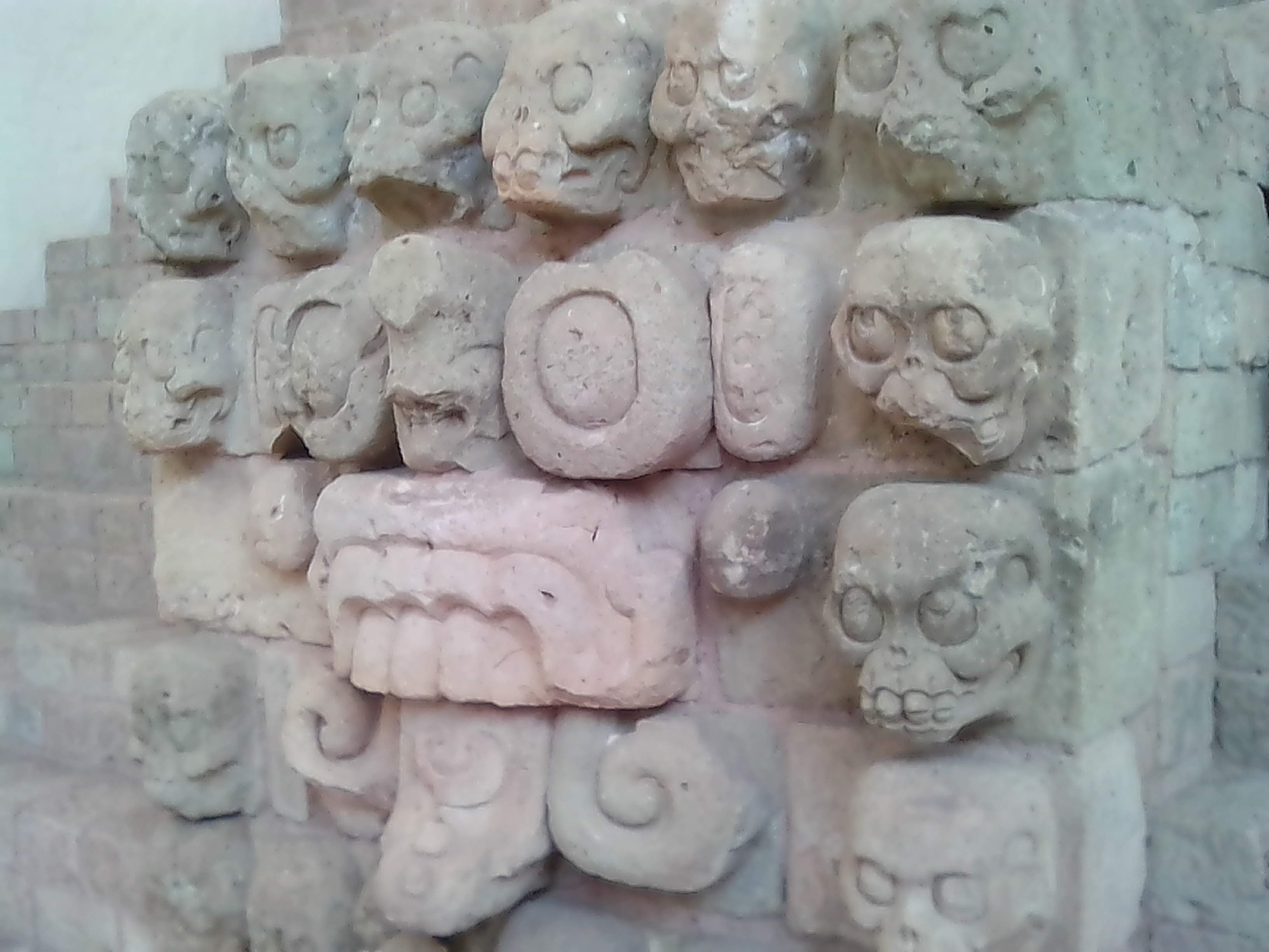 dios de la lluvia